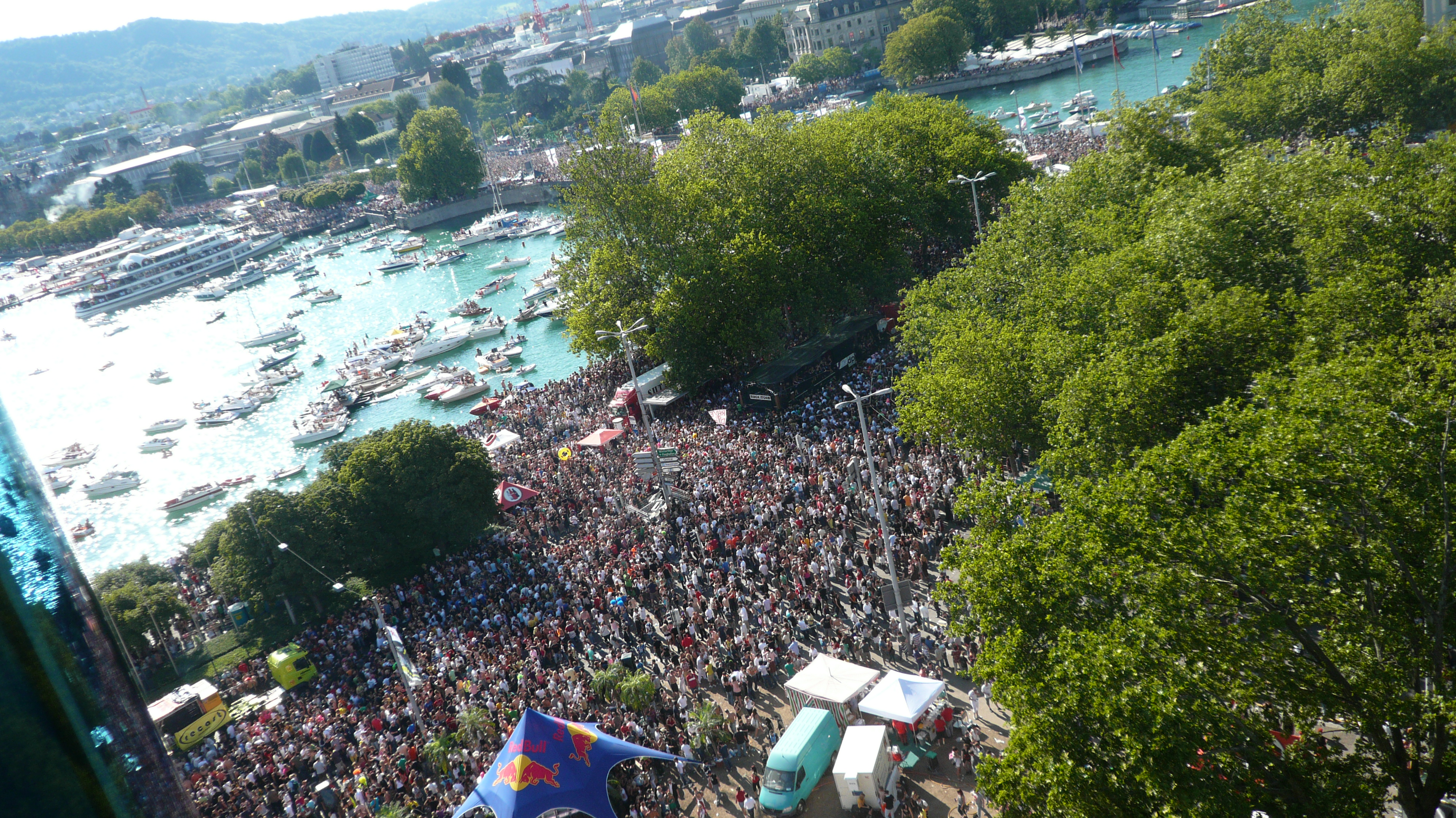 Zürich Street Parade 2008. Sechseläutenwiese